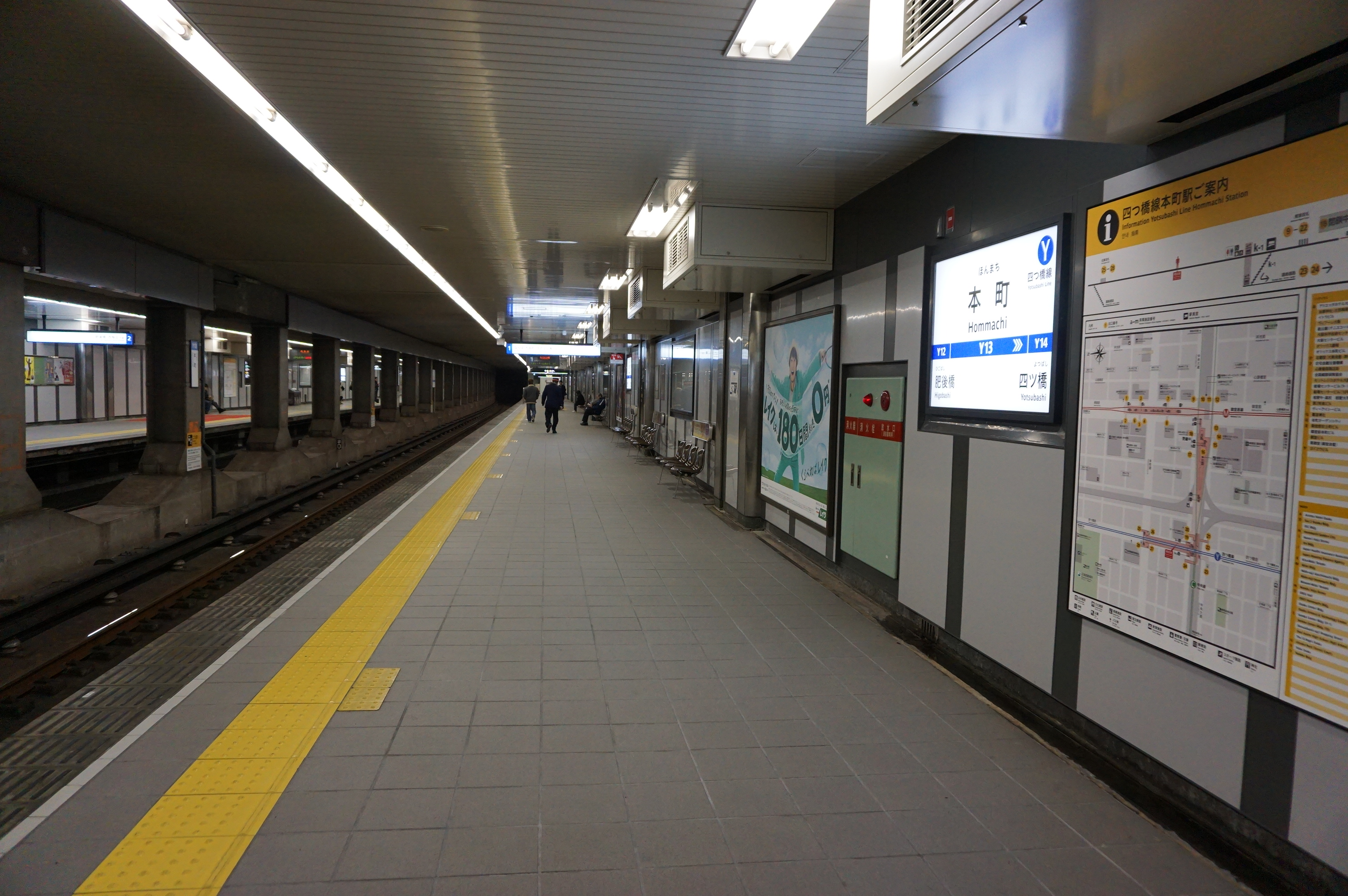 リニューアル後の四つ橋線ホーム